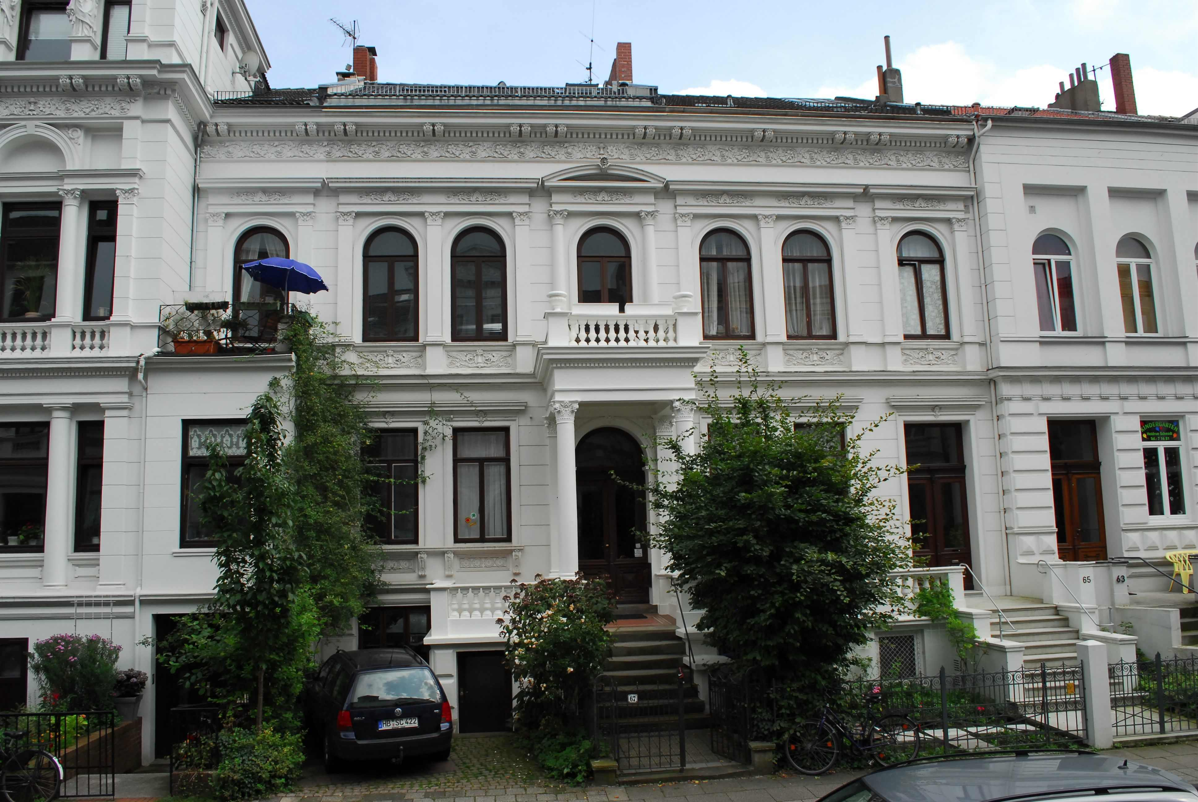 Wohnhaus in Bremen, Herderstraße 67.Das abgebildete Objekt ist ein geschütztes Kulturdenkmal in der Freien Hansestadt Bremen, mit der Nr. 0537 beim Landesamt für Denkmalpflege registriert.